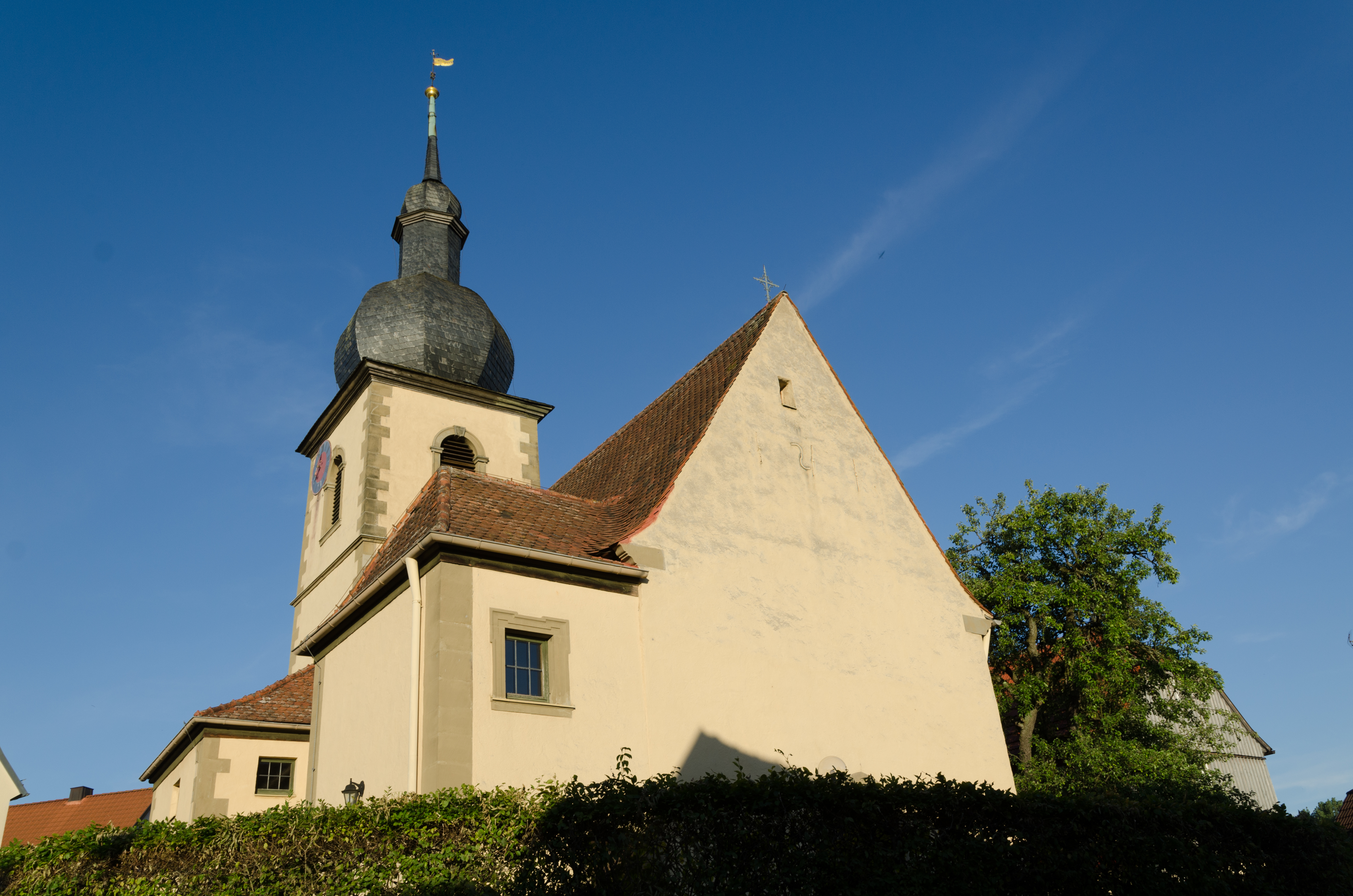 Niederwerrn, Evang-Luth. Pfarrkirche ohne Patrozinium